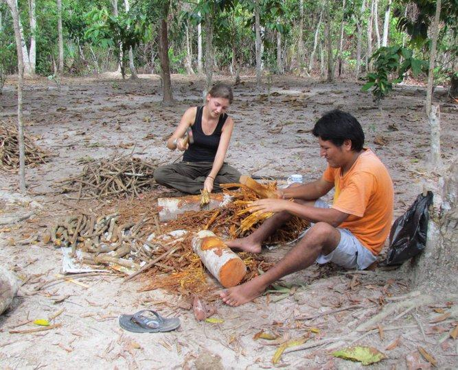 planta sagrada